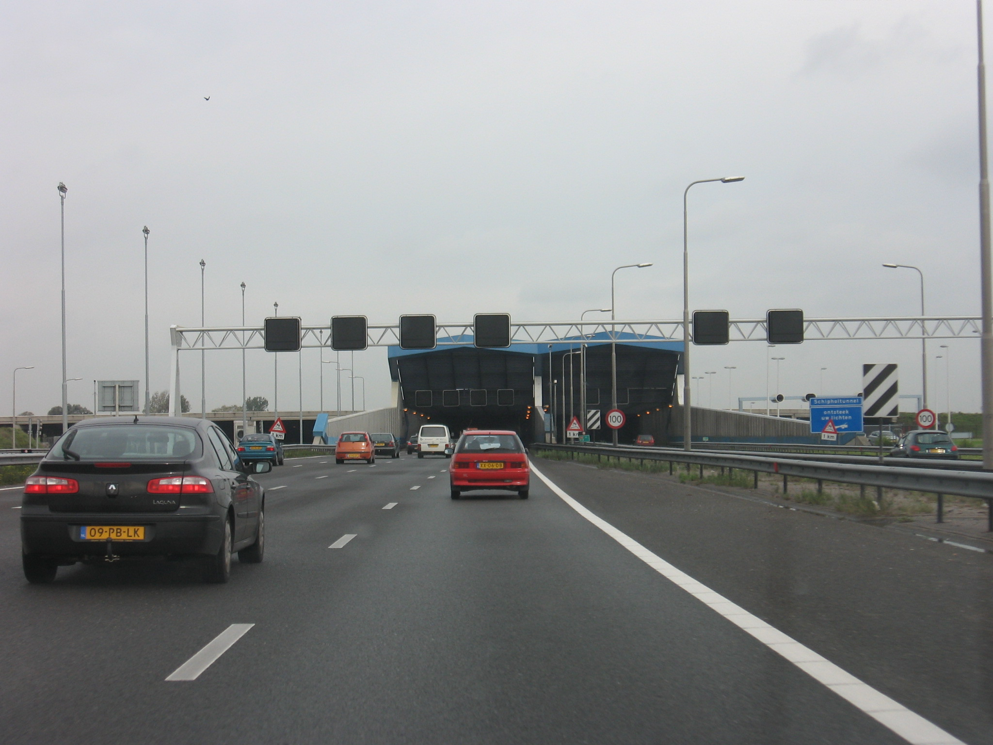 schipholtunnel ingang, zijde Hoofddorp